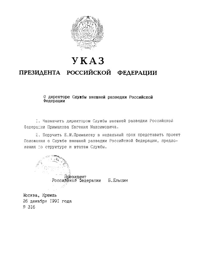 Copie scannée de l’Oukase n°316 du 26.12.1991 du président de Russie portant sur la nomination de Evguéni Primakov comme Directeur du SVR